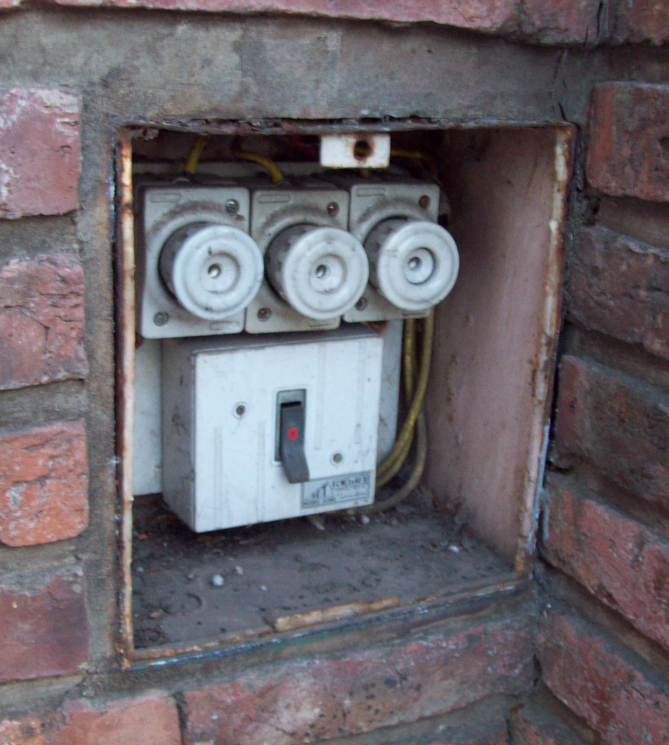 Tres fusibles en un pilar de una residencia, de bajo se ve la lave que acciona la electricidad del hogar.